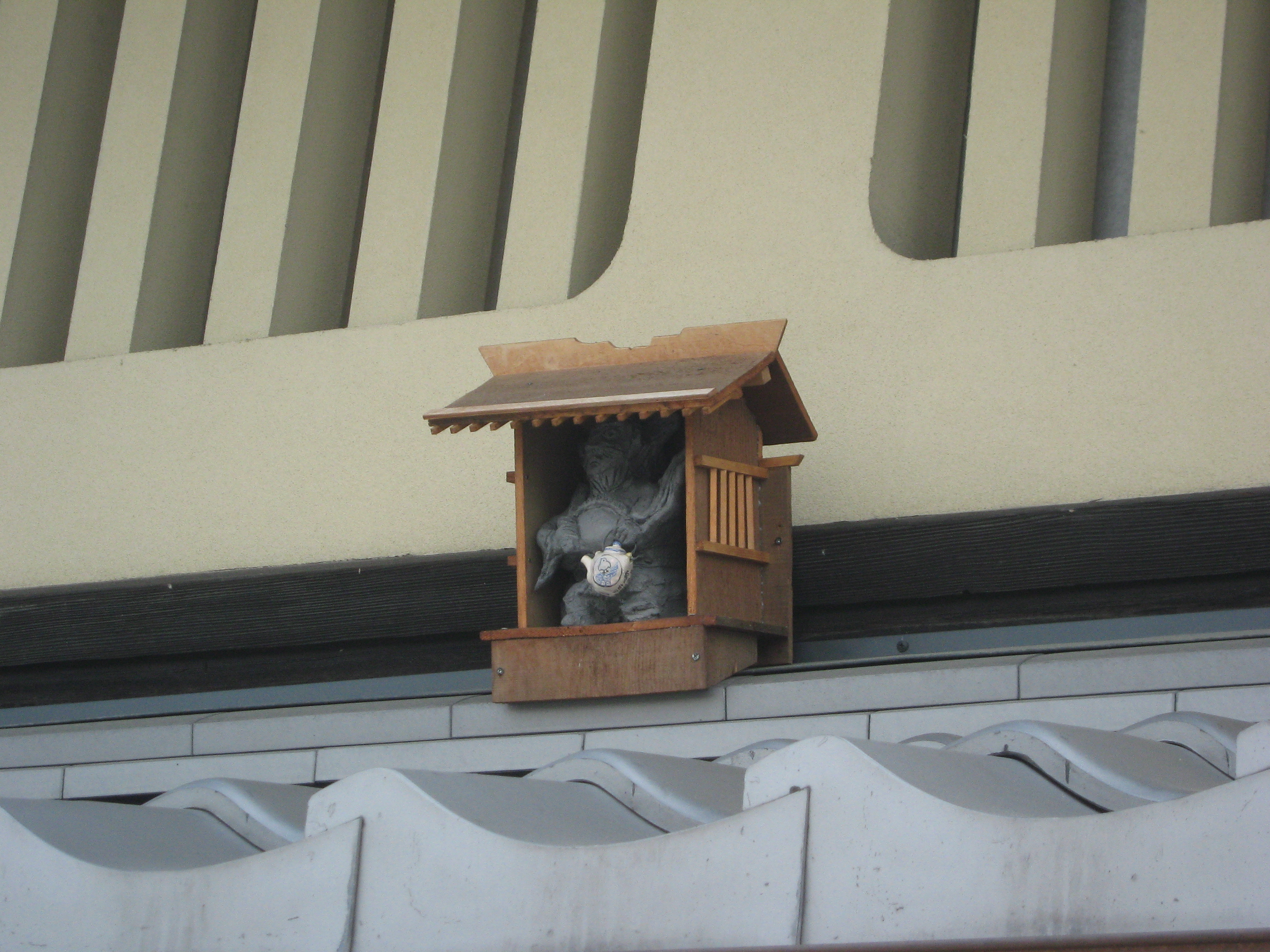 京町家の屋根に置かれている「鍾馗さん」と呼ばれる厄除けの人形。